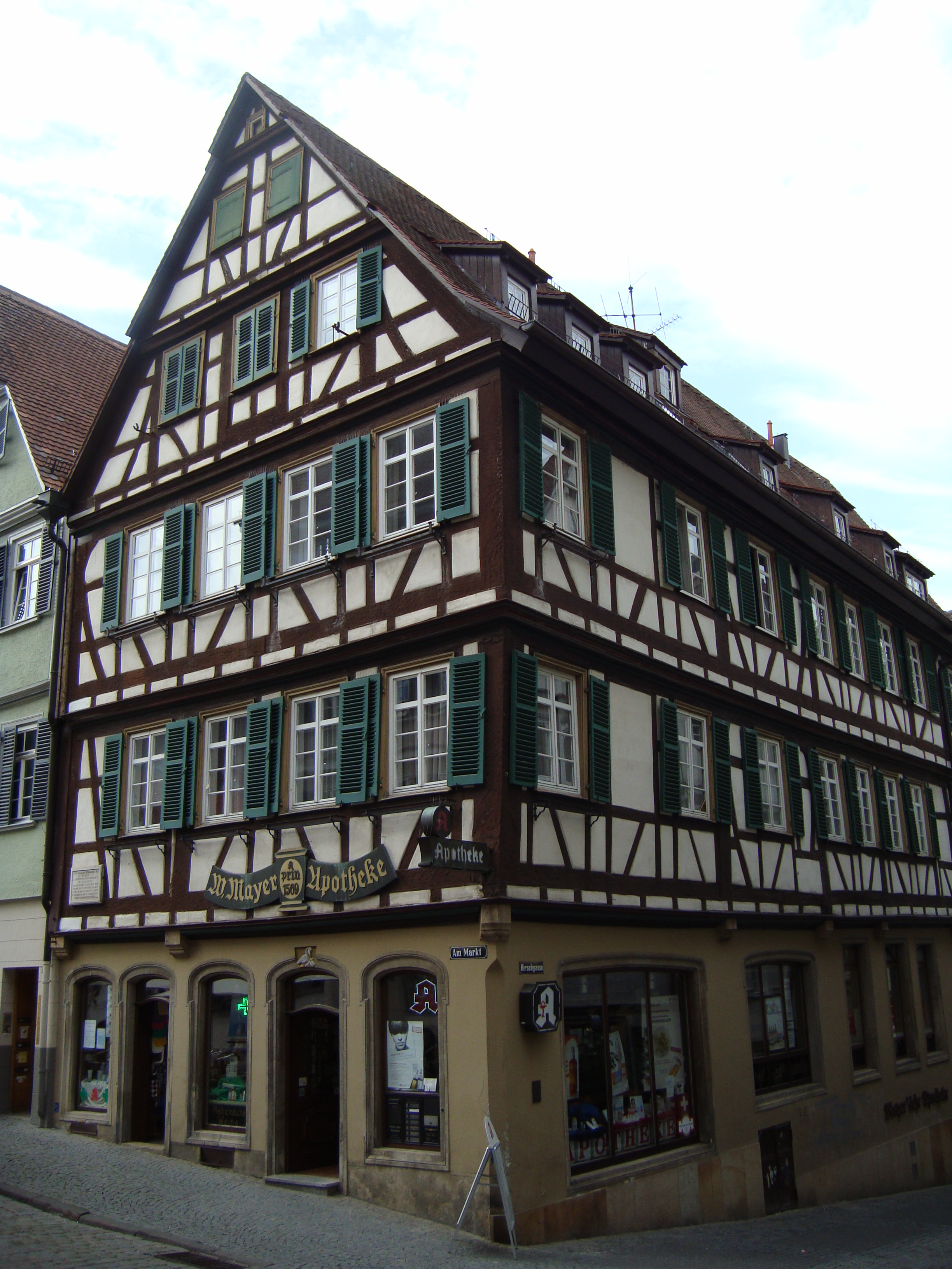 Stammhaus der Familie Gmelin Am Marktplatz Ecke Hirschgasse in Tübingen